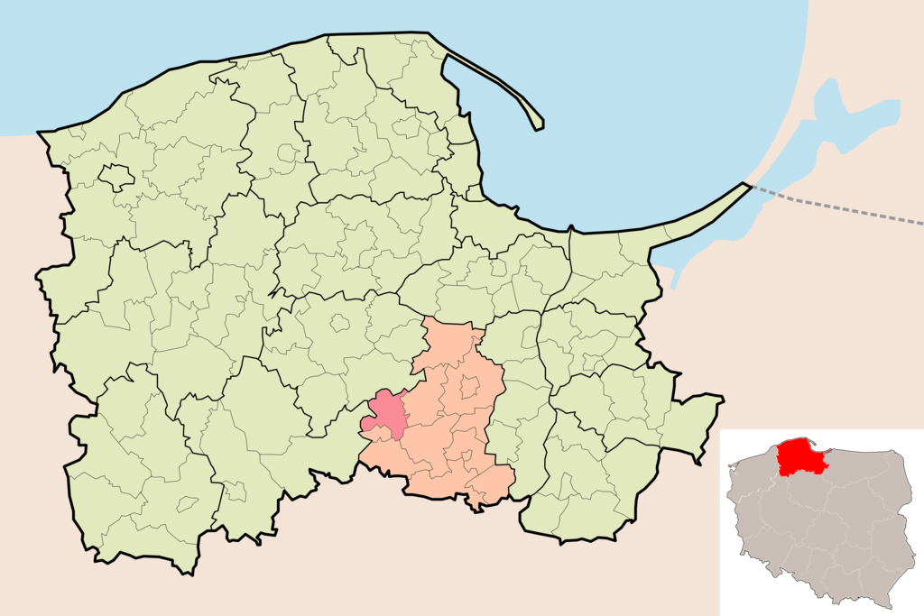 Locator map for communes (gmina) in pomorskie, with powiat highlighted Map - PL - powiat starogardzki - Kaliska.PNG